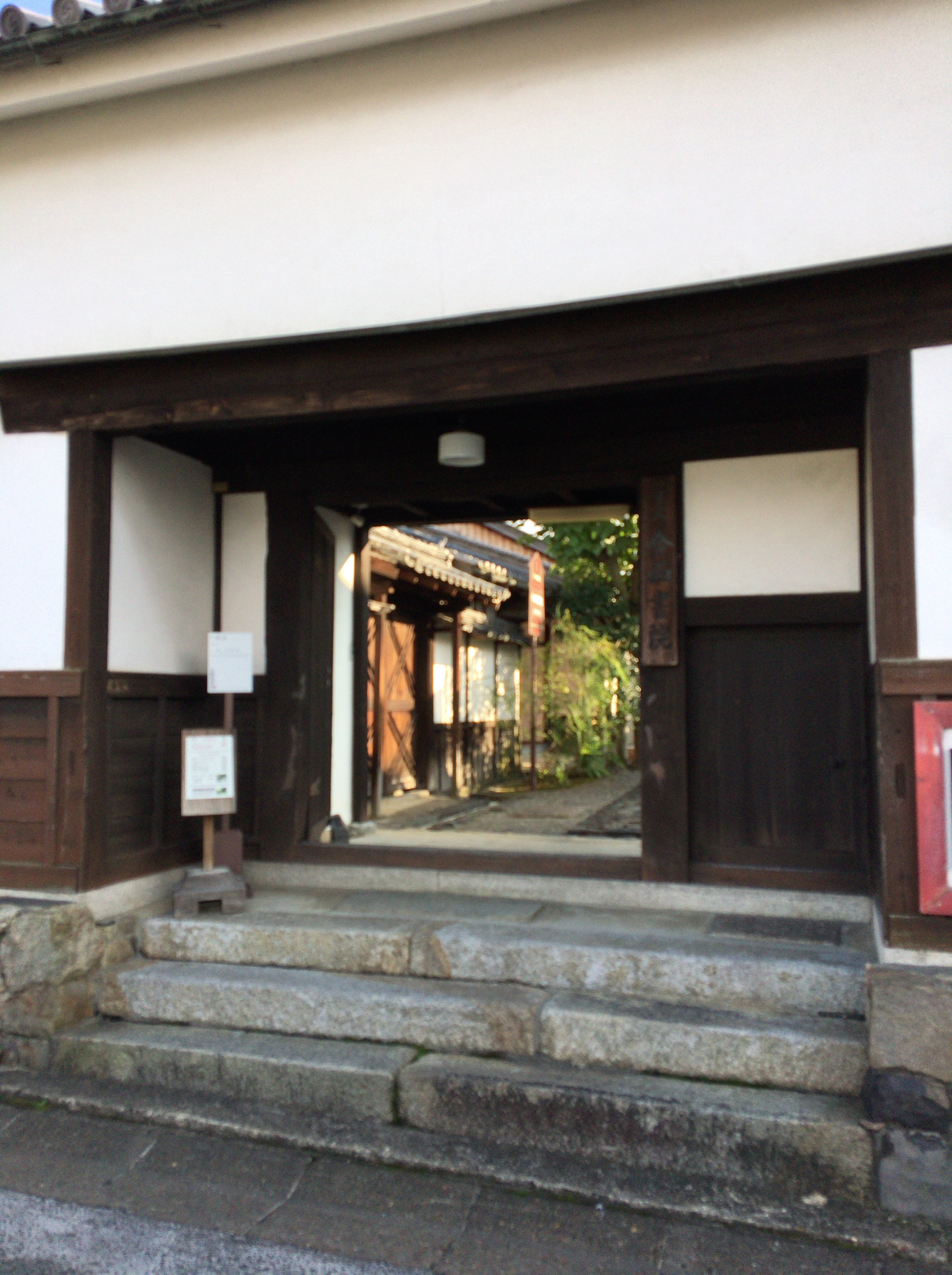 〒630-8381 奈良県奈良市福智院町24-1 今西家書院様の入り口を撮影